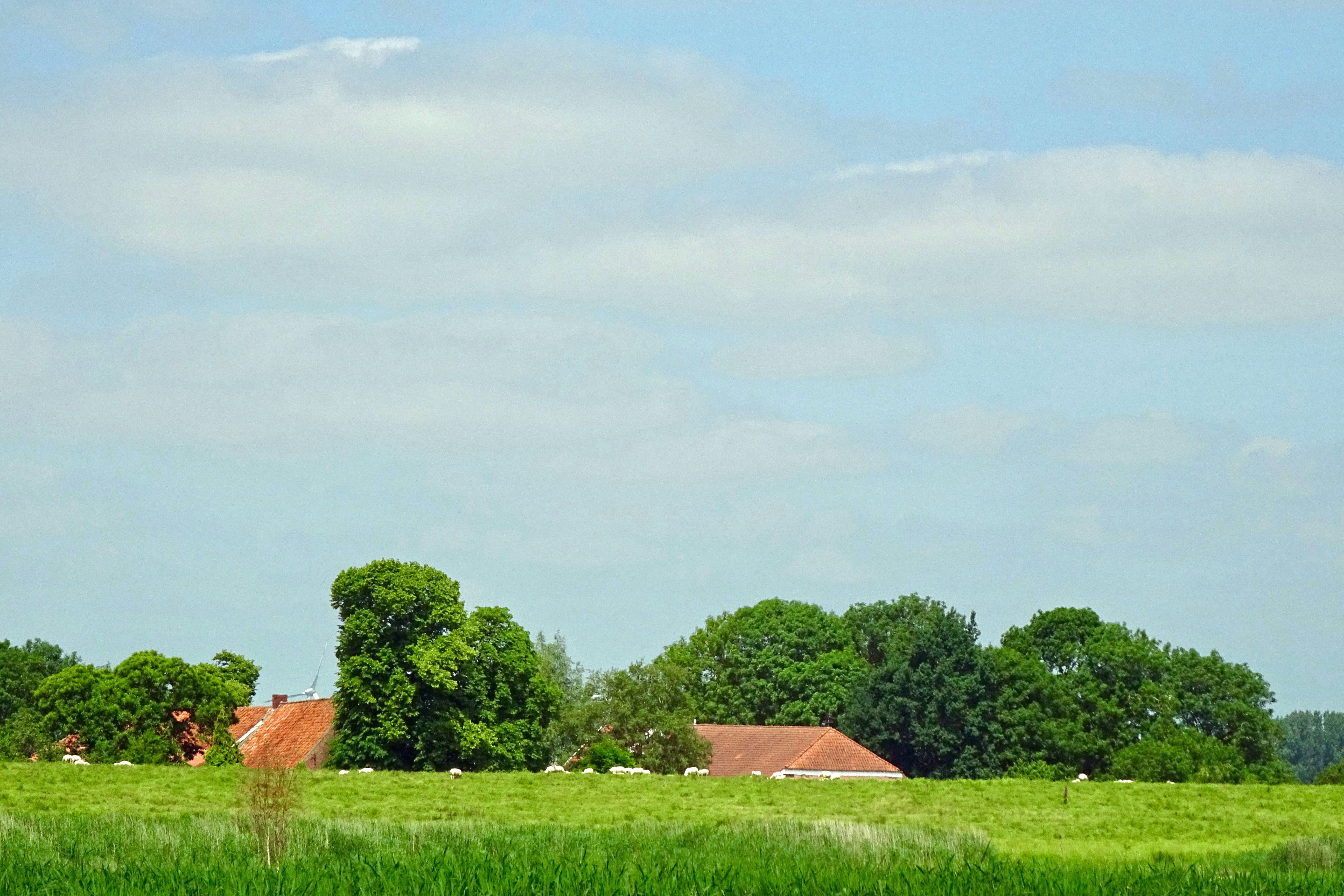 Zicht op Ferstenborgum gezien vanaf de overzijde van de Ems nabij Dorenburg